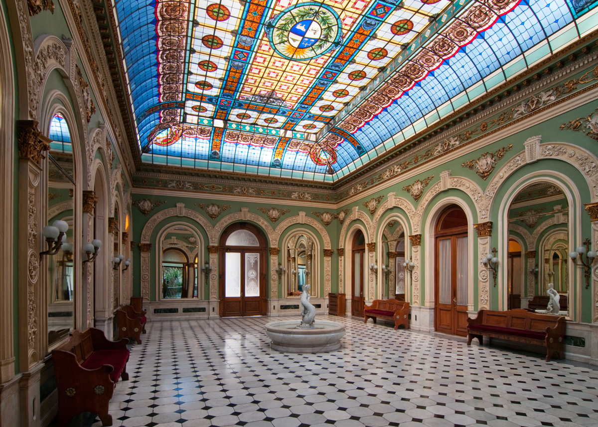 Casa del Tte. Gral. Máximo Santos - Sede del Ministerio de Relaciones Exteriores / Palacio Santos. Ubicada en el departamento de Montevideo